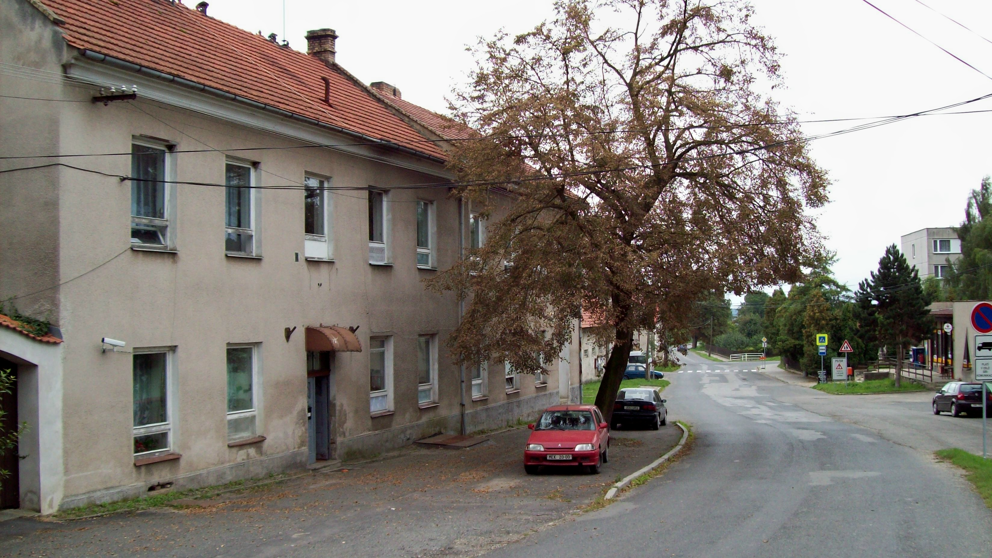 Střednice u Mělníka.